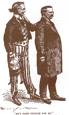 Wahlkampfzeichnung für Theodore Roosevelt